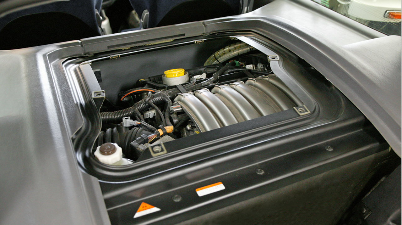 Renault / TWR Clio V6 (Renault L7X engine)